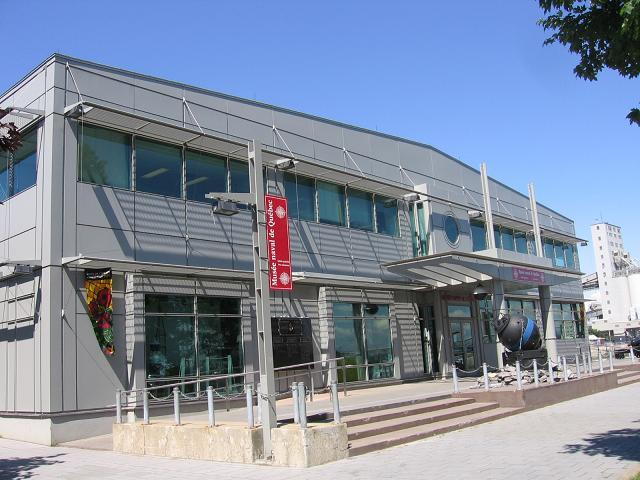 Le Musée naval de Québec dans le vieux-port